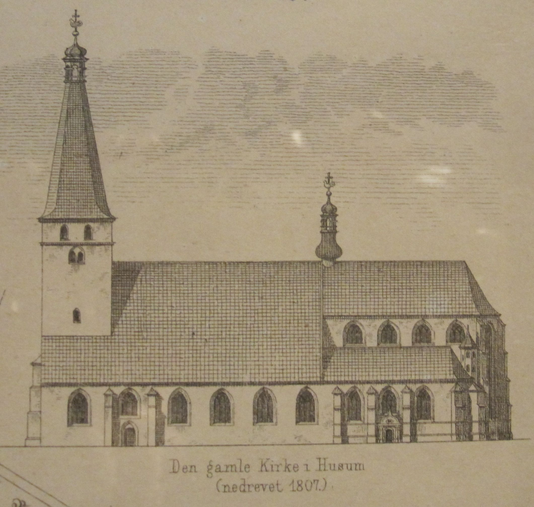 Eine Grafik mit der Darstellung der Marienkirche vor dem Abriß 1807 wegen angeblicher Baufälligkeit. Diese Vernichtung wird noch im 20. Jahrhundert als einer „der größten Verluste in der Architekturgeschichte Schleswig-Holsteins“ bezeichnet. (Dietrich Ellger in Heinz Rudolf Rosemann (Hrsg.): Niedersachsen, Hansestädte, Schleswig-Holstein, Baudenkmäler. Reclams Kunstführer, Deutschland, Band 5, 4. Auflage, Stuttgart 1971, S. 332) Foto einer im Theodor-Storm-Haus in Husum ausgestellten Grafik des 19. Jahrhunderts.